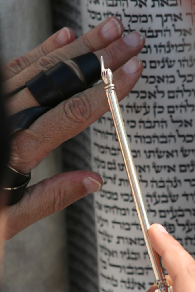 Reading Torah (Parashat Noah)